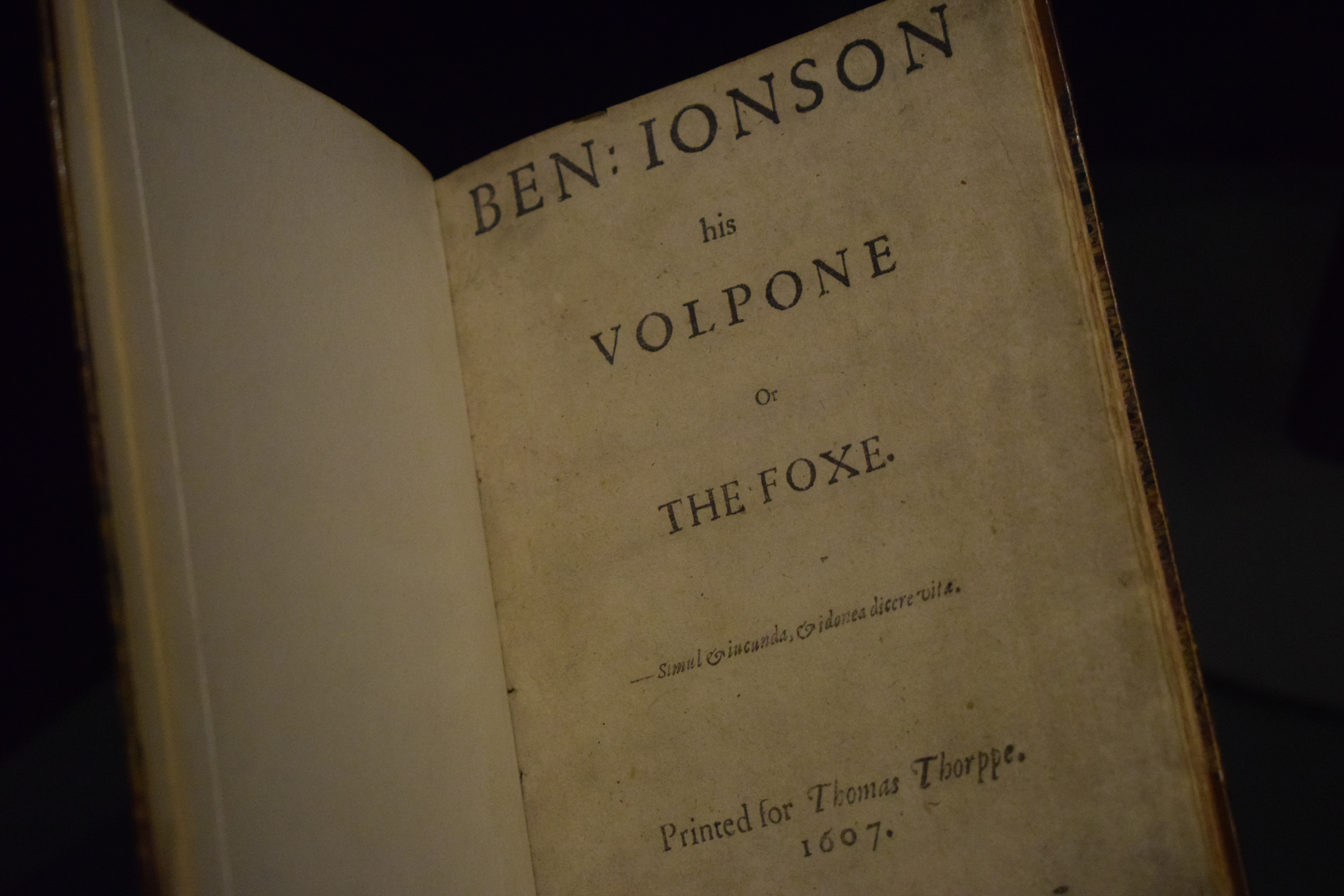 Ben Jonson (1572-1637) « Volpone, or The Fox » Londres, 1607, édition originale Fondation Martin Bodmer (Suisse)